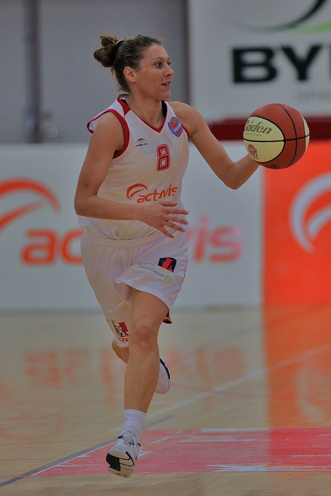 Slavica Dimovska of Haukar in 2009.